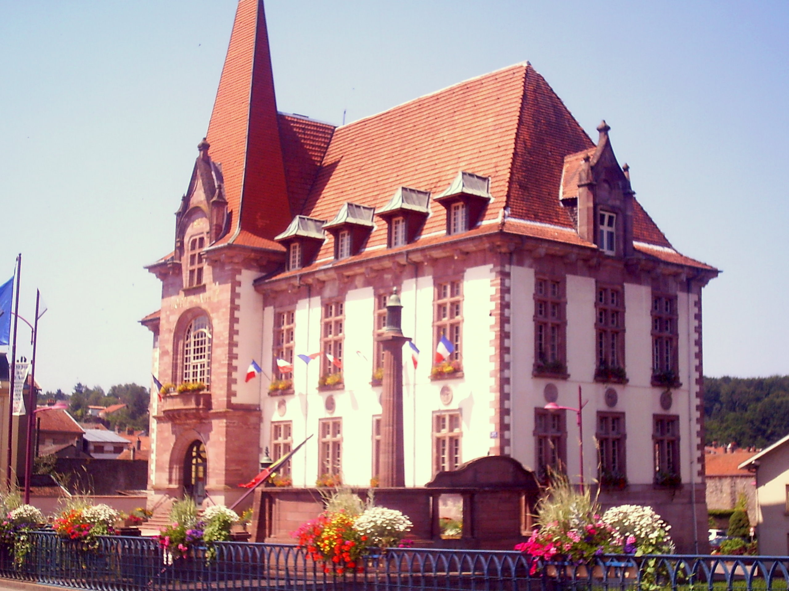 Mairie de Baccarat (54, FRANCE)